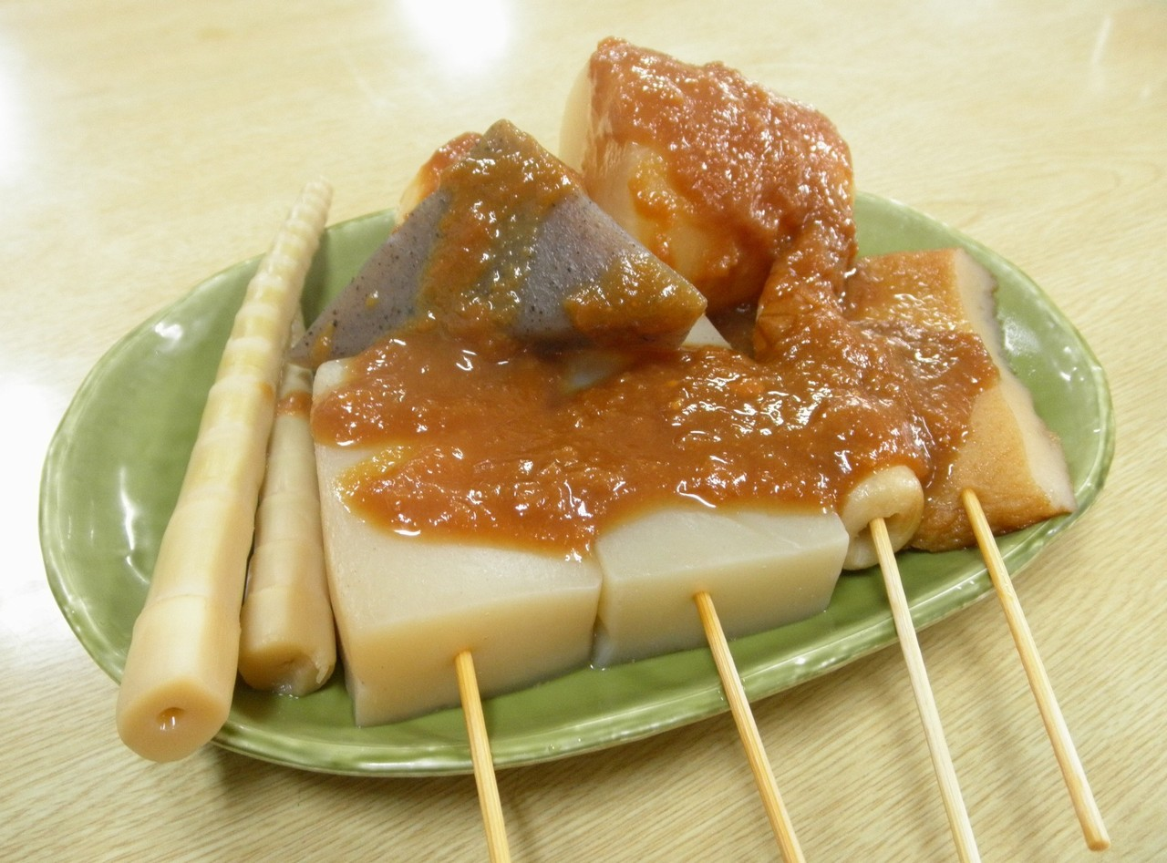 青森生姜味噌おでん（日本国青森県青森市）